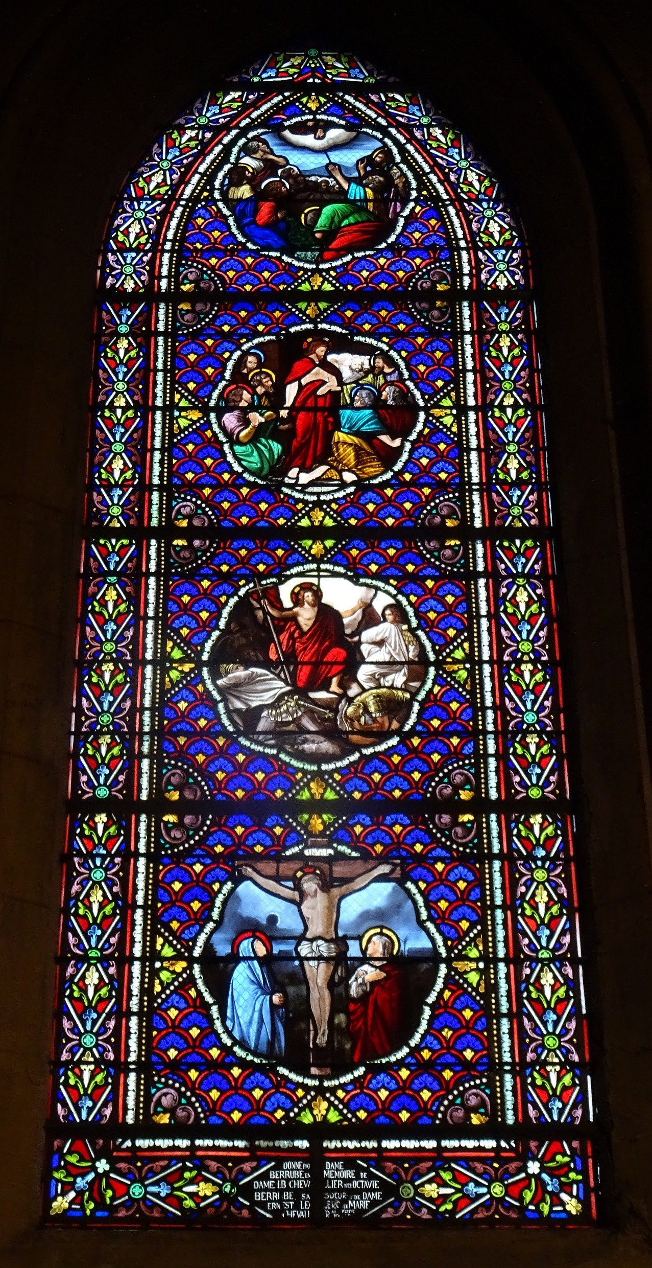 Maromme : Vitrail de l'église Saint-Martin